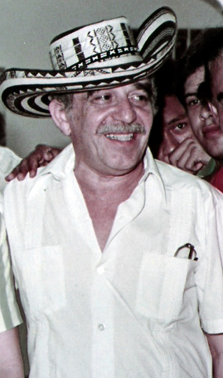 Gabriel Garcia Marquez